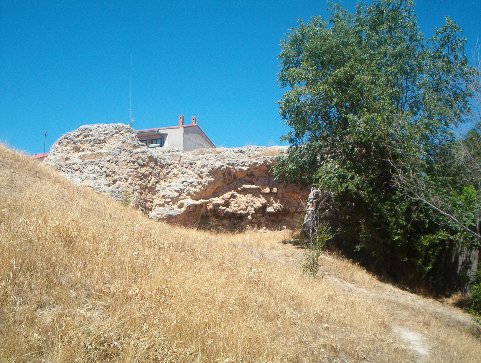 Ruinas del antiguo castillo de Alaejos (Valladolid, Castilla y León).